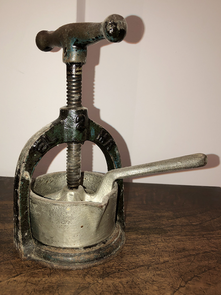 Exprimidor de carne para llograr el so zusmiu